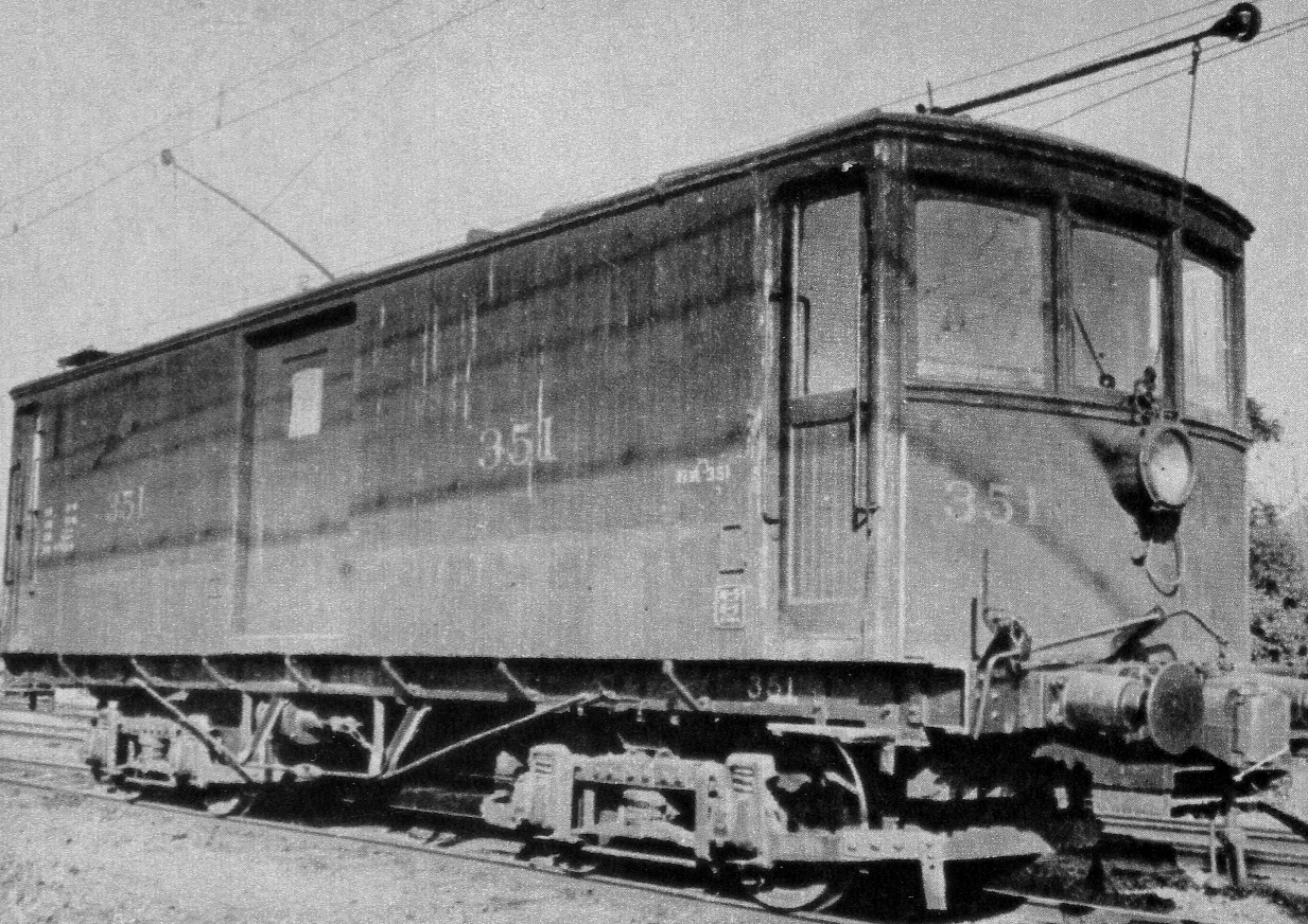 愛電デワ350形